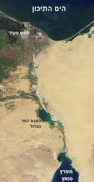 תצלום לווין של תעלת סואץ מתוך ויקיפדיה האנגלית עם כיתוב בעברית